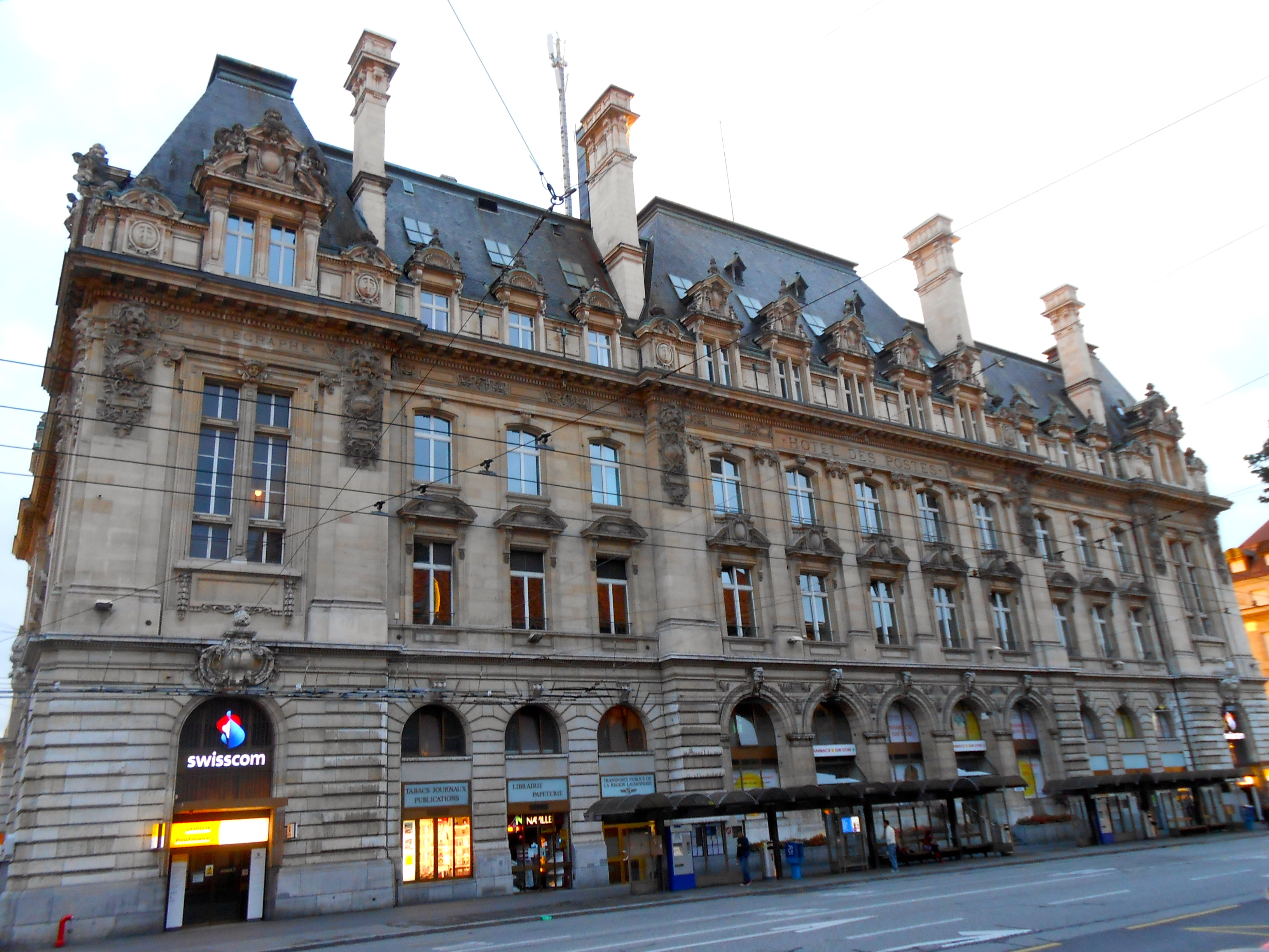 Hôtel des Postes, Place Saint-François 15, Lausanne